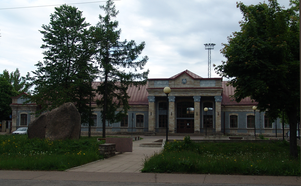 Железнодорожный вокзал, Нарва